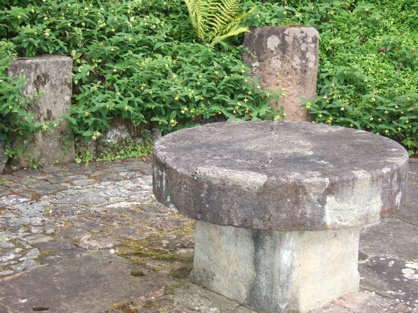 Sitzplatz im Garten der Kunststiftung Paul Kälberer, Glatt (Sulz am Neckar) Verwendung mit Erlaubnis des Urhebers